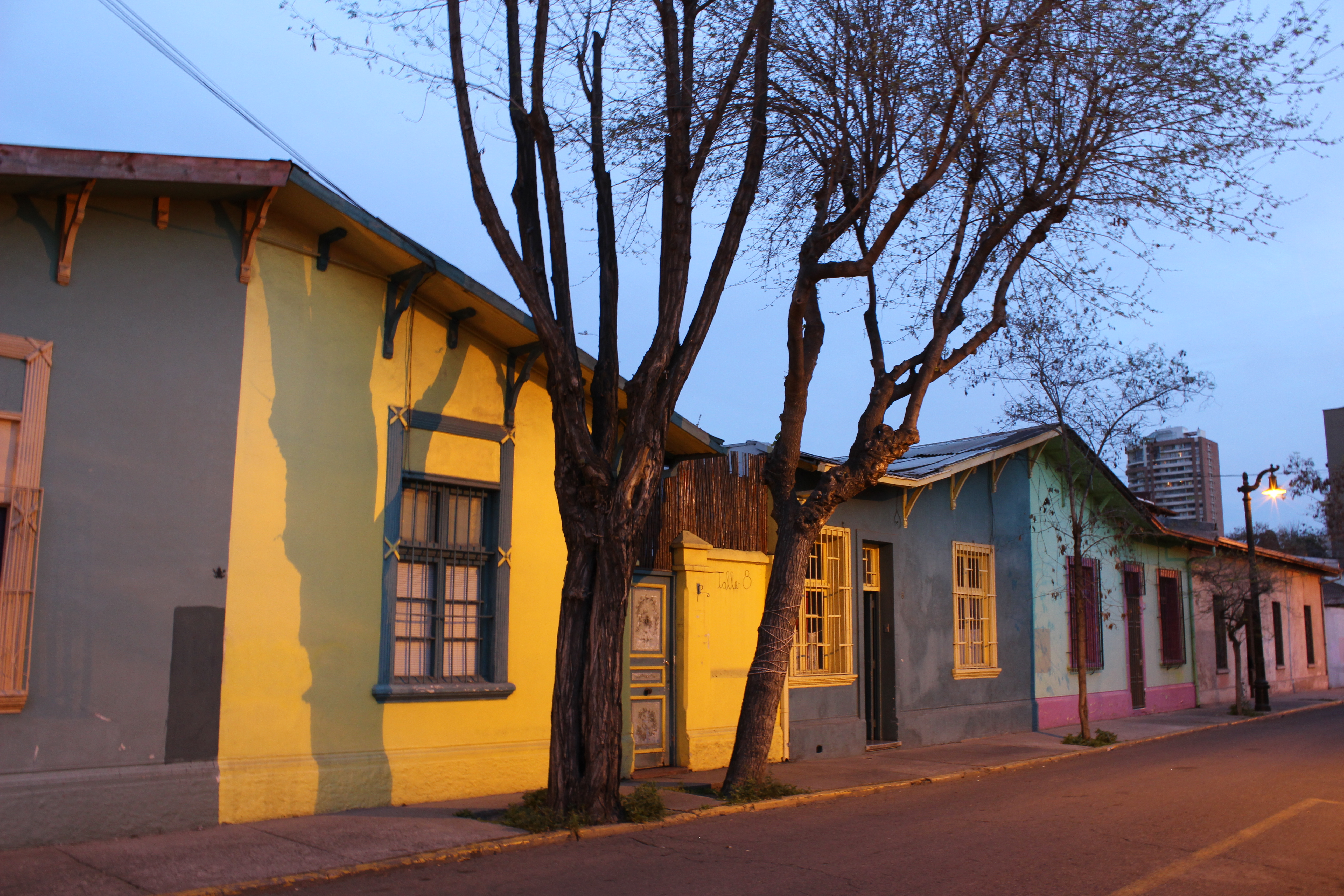 Calle Salvador Donoso This is a photo of a national monument in Chile: 246